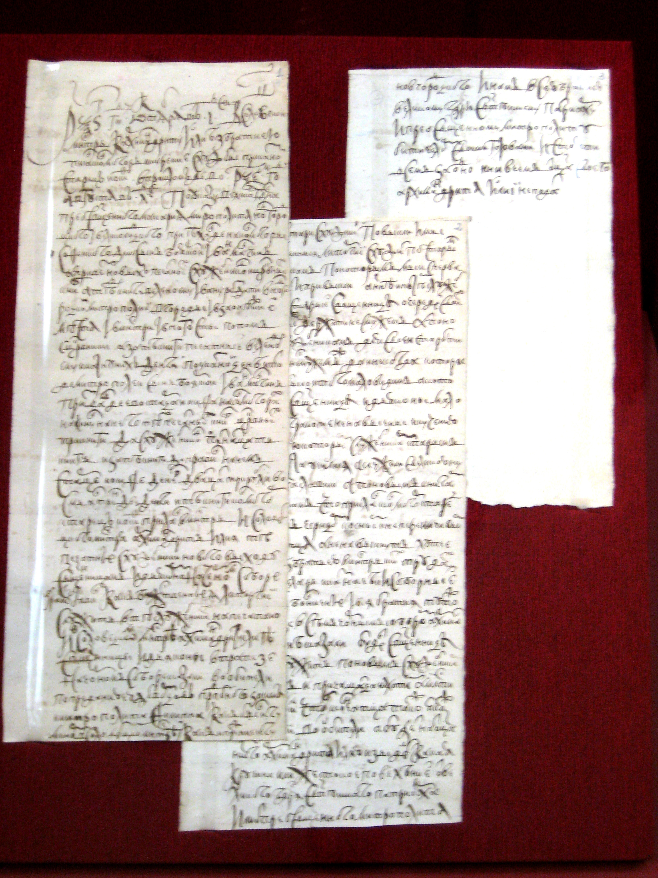 Список экспонатов ГРАМОТА. СОБОРНЫЙ ПРИГОВОР СОЛОВЕЦКИХ ИНОКОВ О НЕПРИЯТИИ НОВОПЕЧАТНЫХ КНИГ 8 июня 1658 года 3 л. Бумага; чернила 45 х 16; 30 х 16; 27 х 16 Поступила в 1920 году Происходит из Синодальной патриаршей библиотеки, Москва Реставрирована в 1993 году в ГИМ ГИМ инв. 80370, ОР Син. свиток 1171